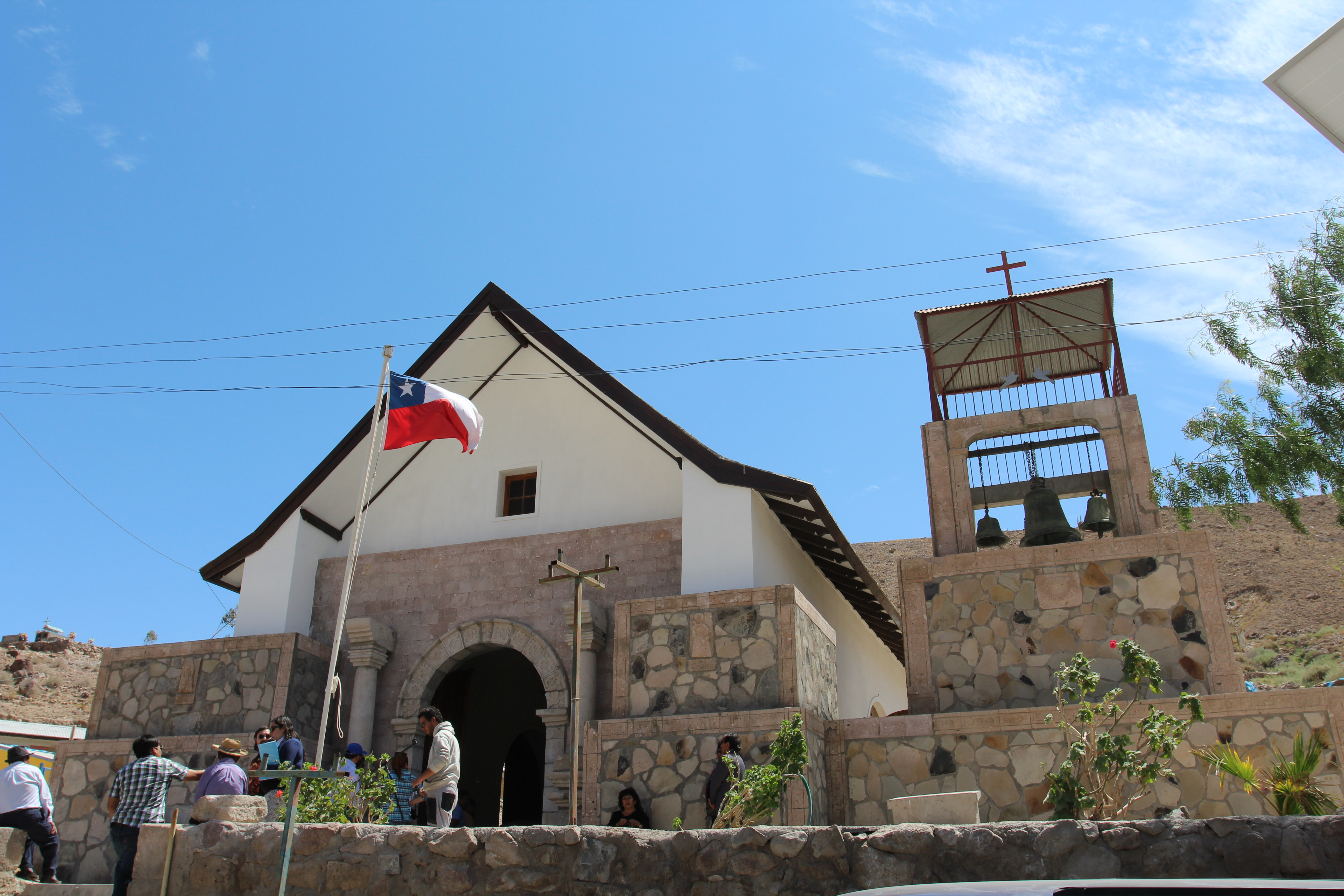 Visita a la región de Tarapacá